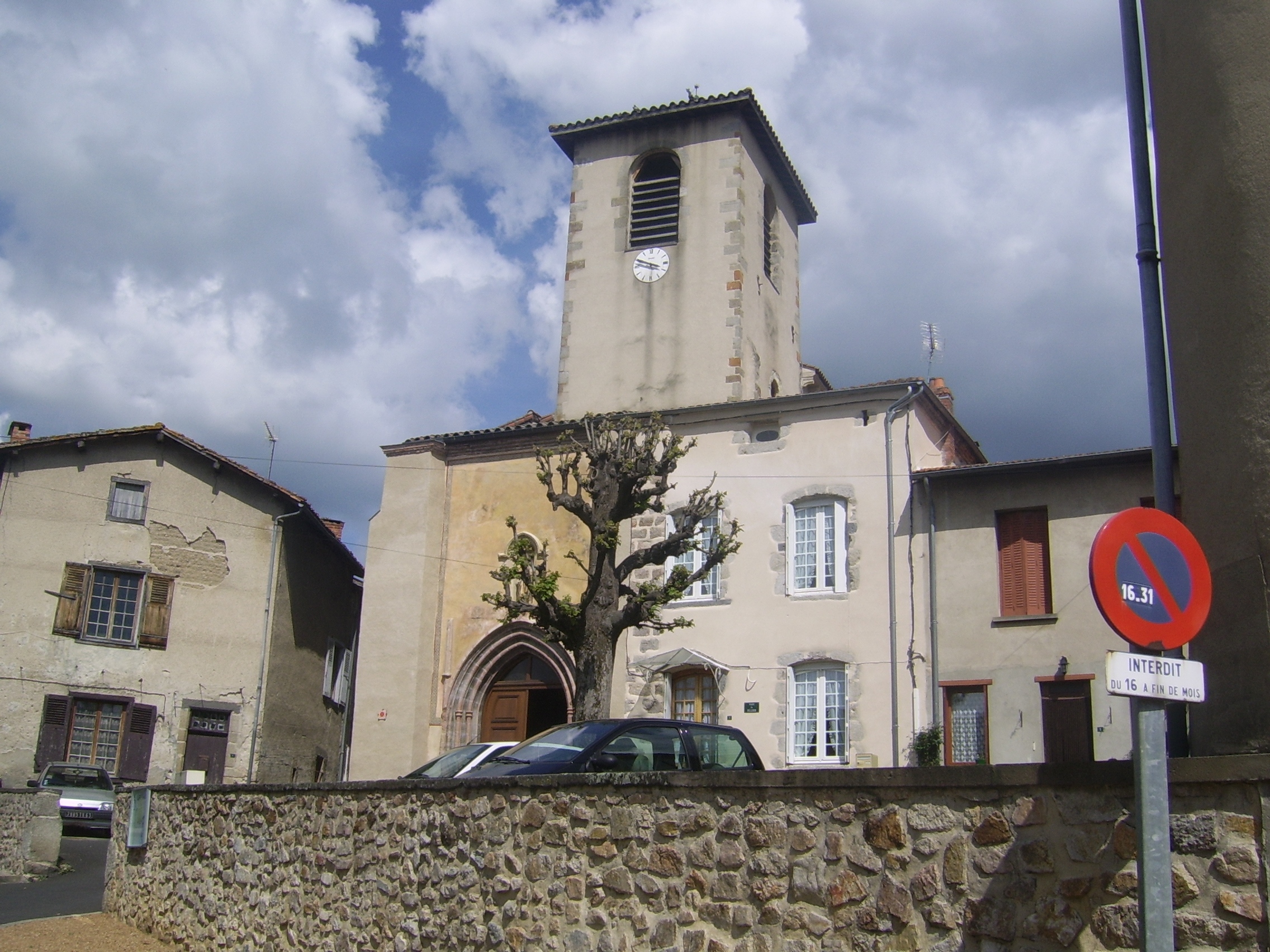 Bourg de Ris (Puy de Dôme)